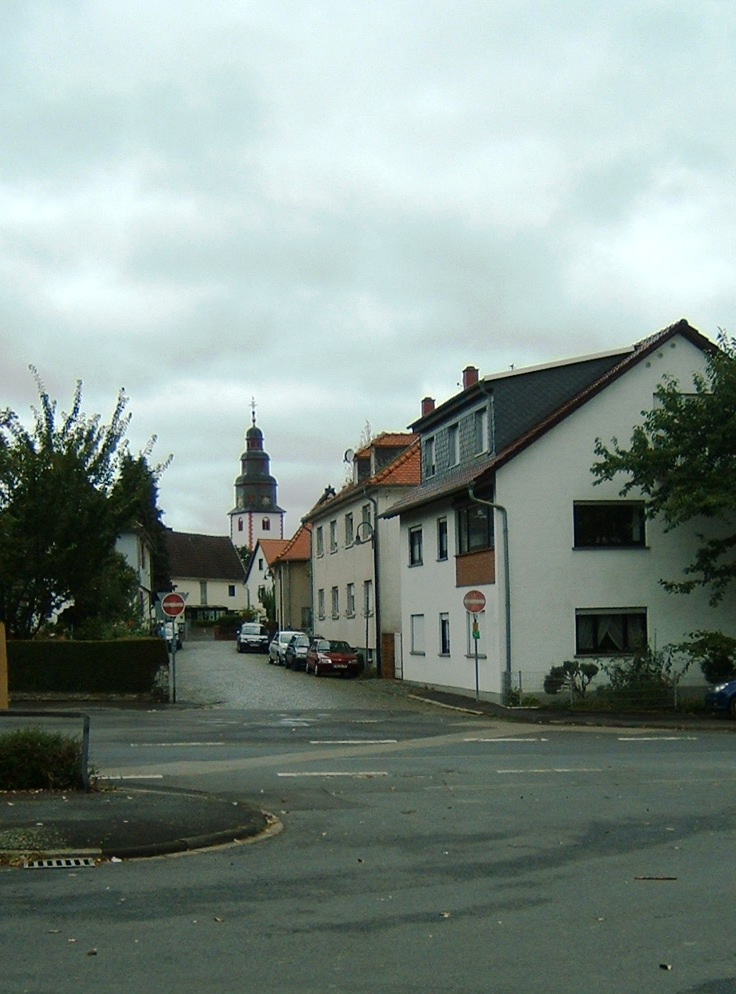 Rodheim (Hessen) Blick auf die Kirche von der Schule aus